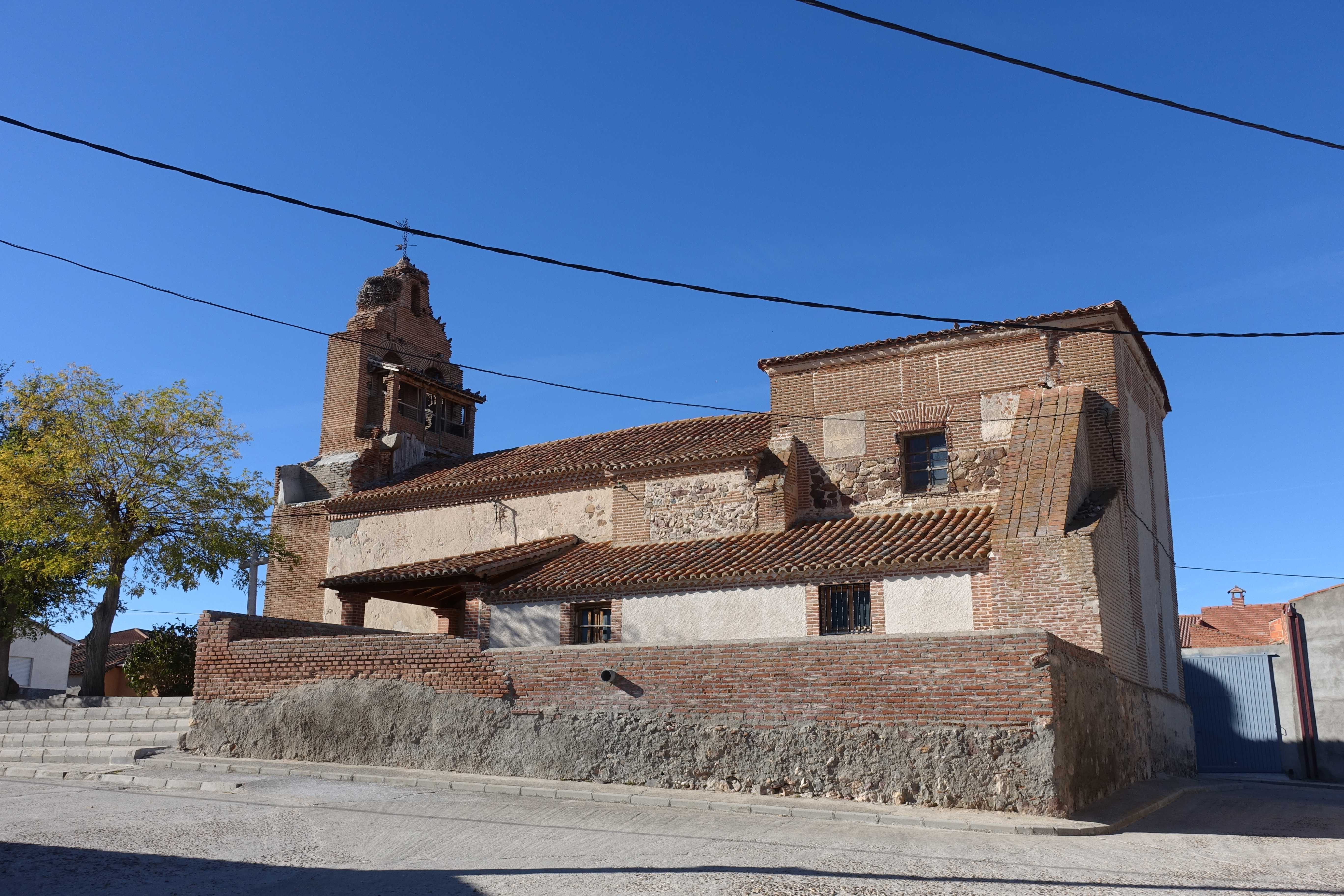 Iglesia de San Andrés Apóstol, en Muñogrande (Ávila, España).